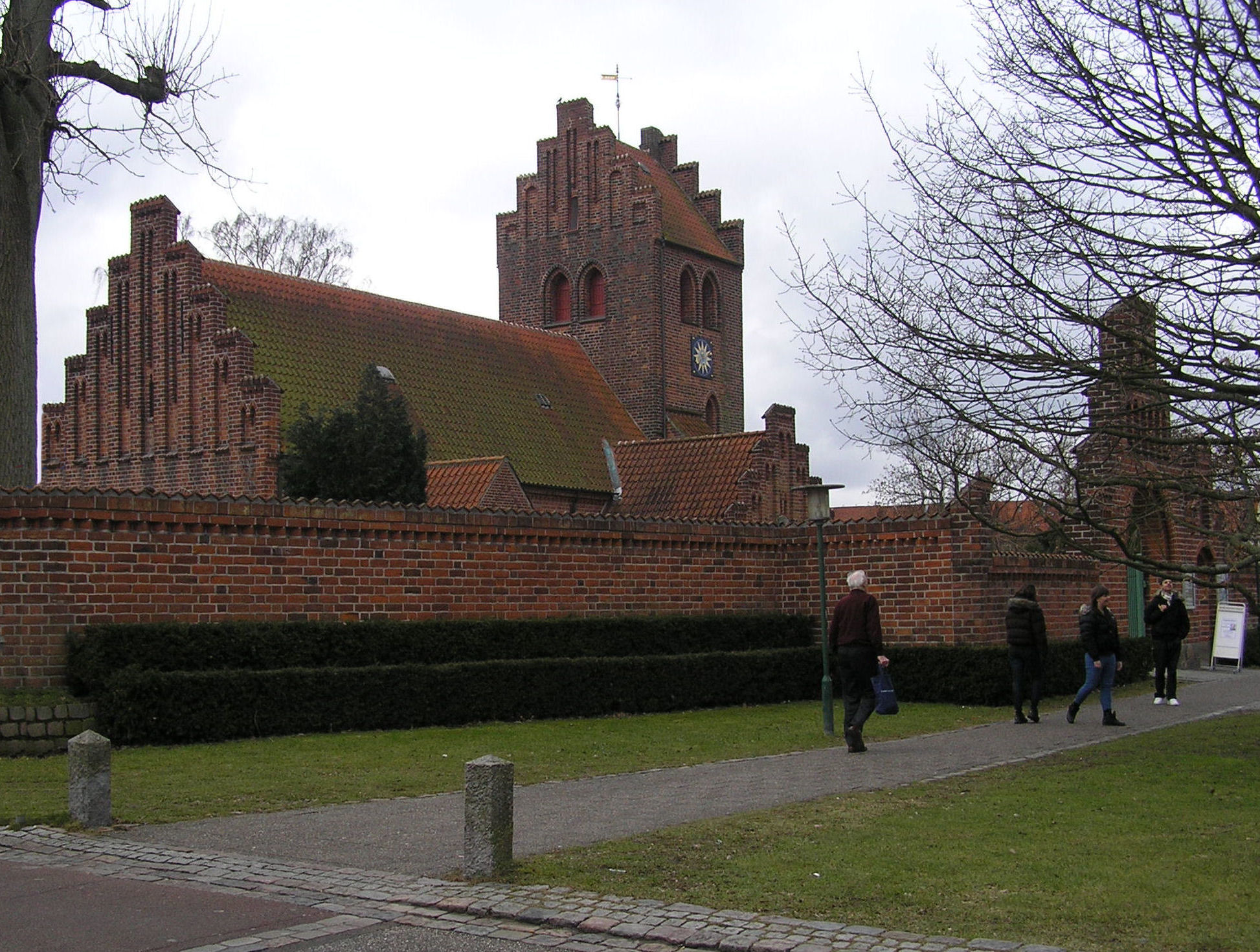 Herlev Kirke